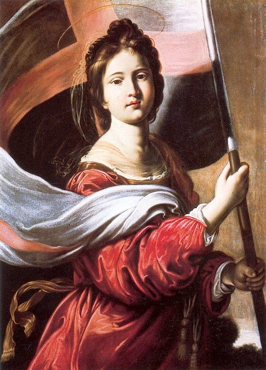 Santa Ursula